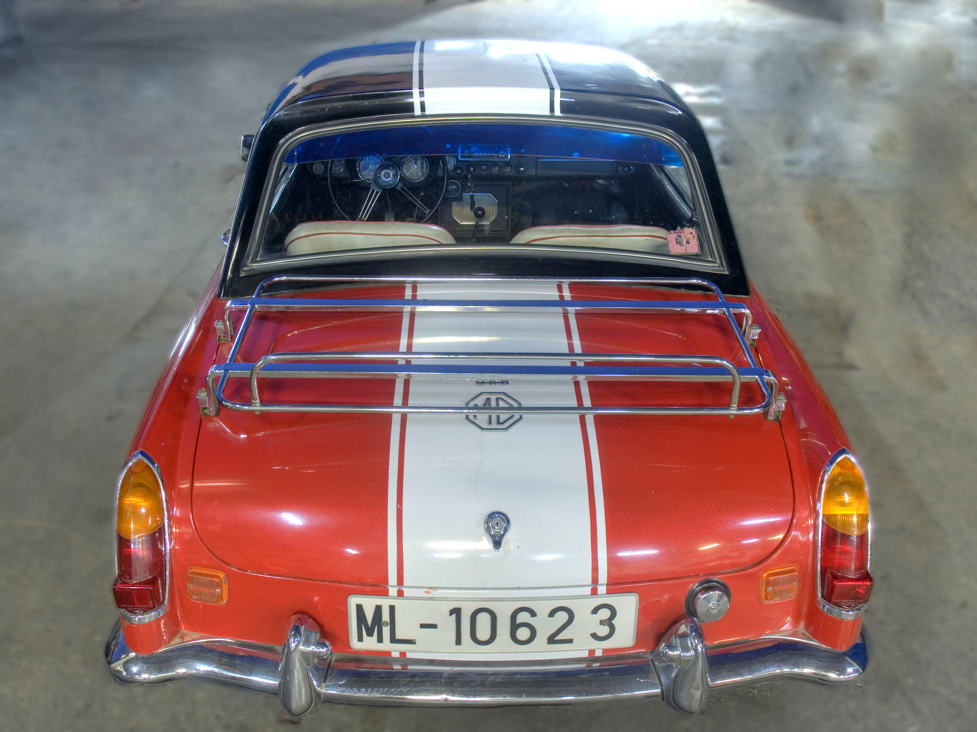 Museo Historia del Automóvil en Melilla Siglo XX